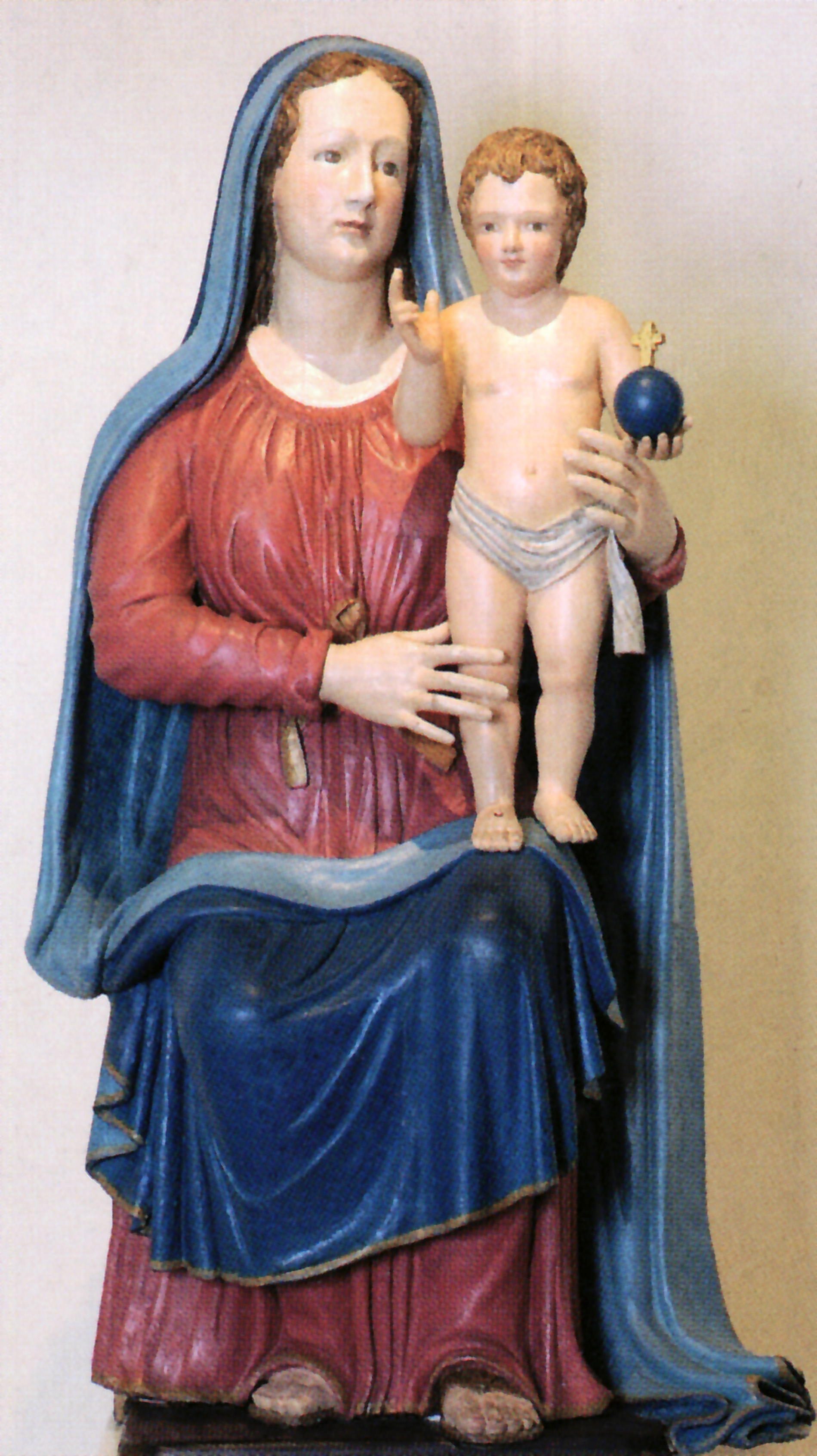 Santuario di Santa Maria in Penice - statua della Madonna del Penice con Bambino (XIX sec.)